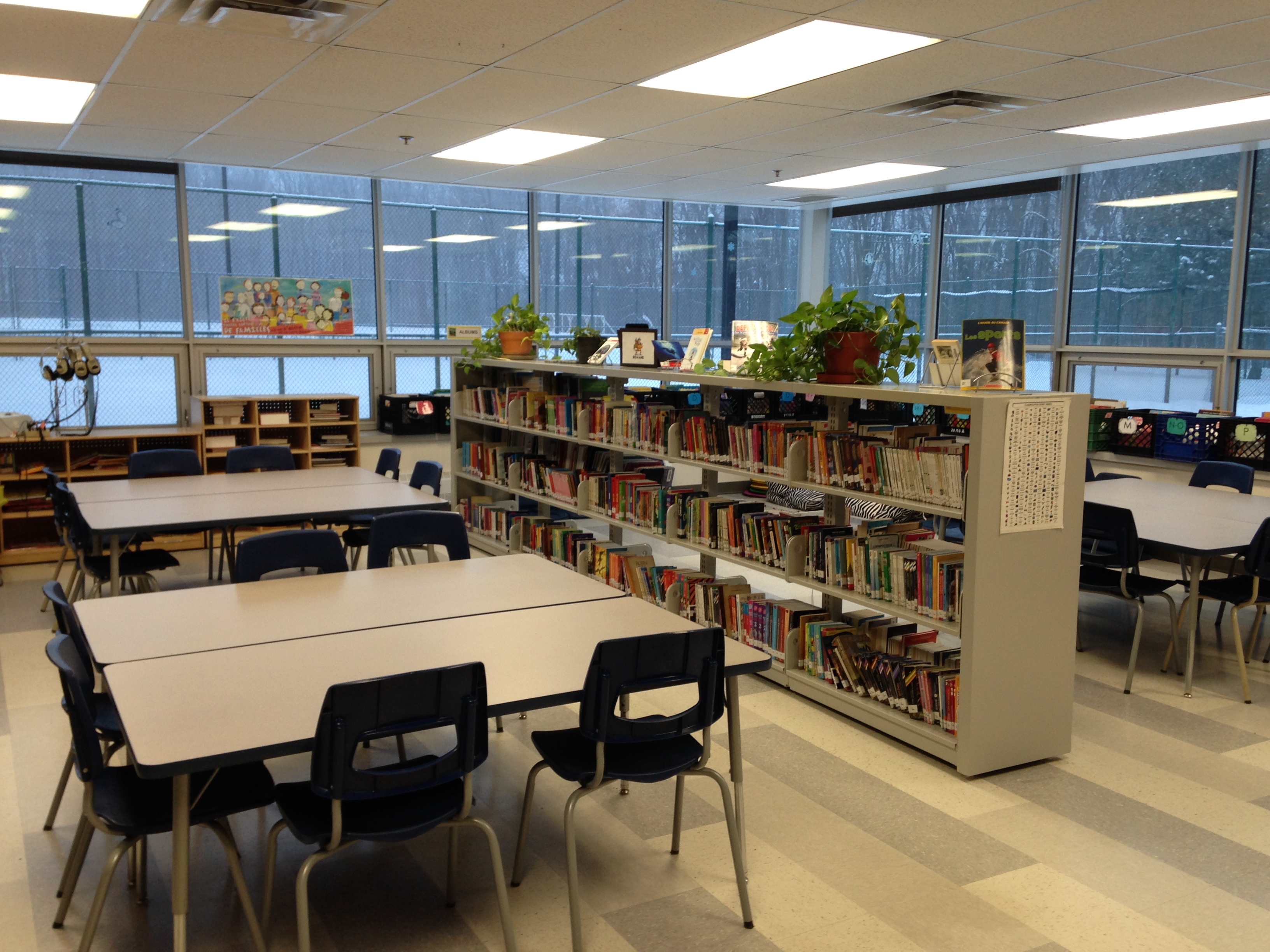 Image d'une bibliothèque scolaire dans une école primaire au Québec